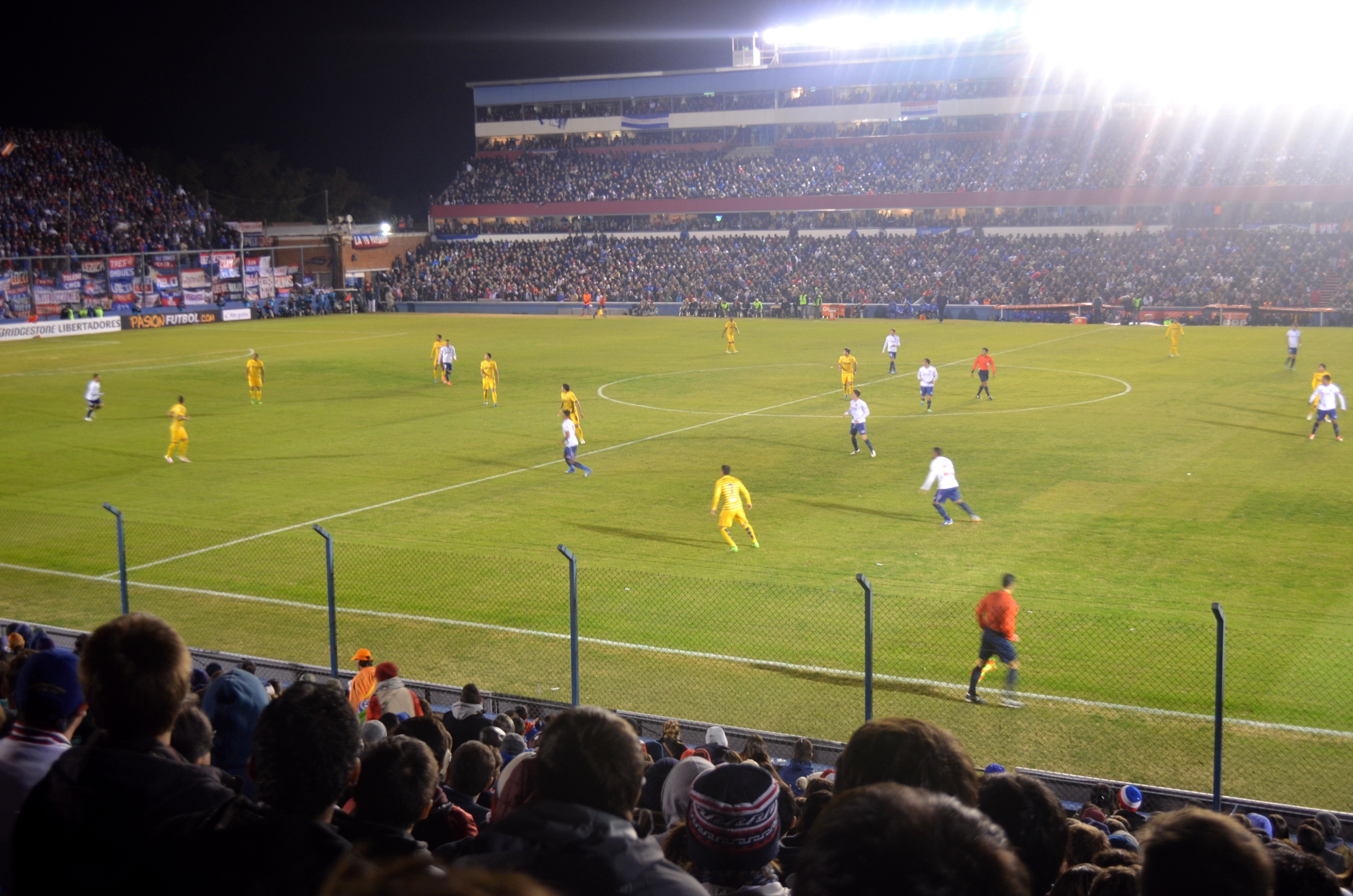 Imagen del partido disputado entre Nacional y Boca Juniors, en el estadio Gran Parque Central, por los cuartos de final de la Copa Libertadores 2016